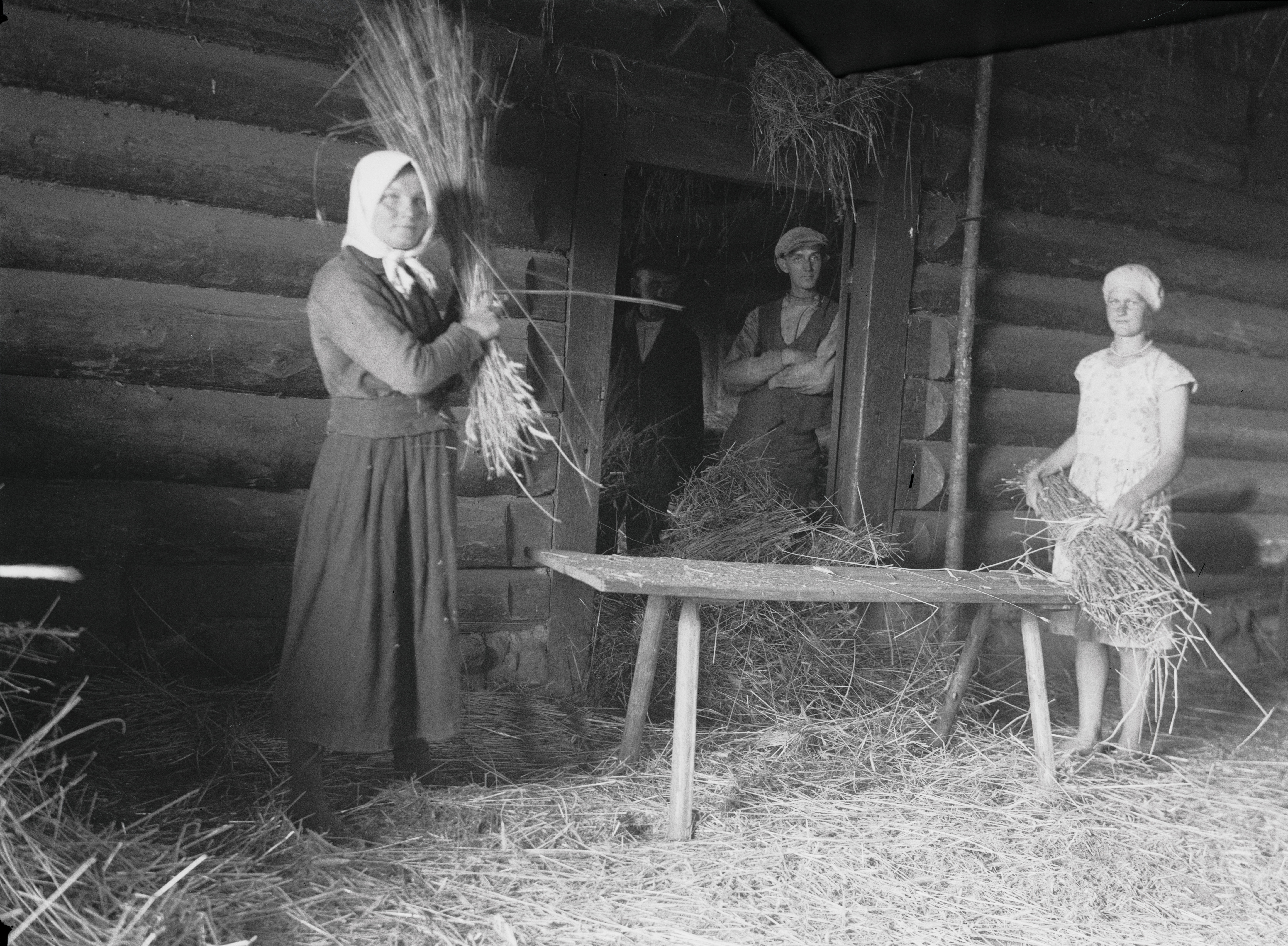 Rehe ülerabamine rehetoas